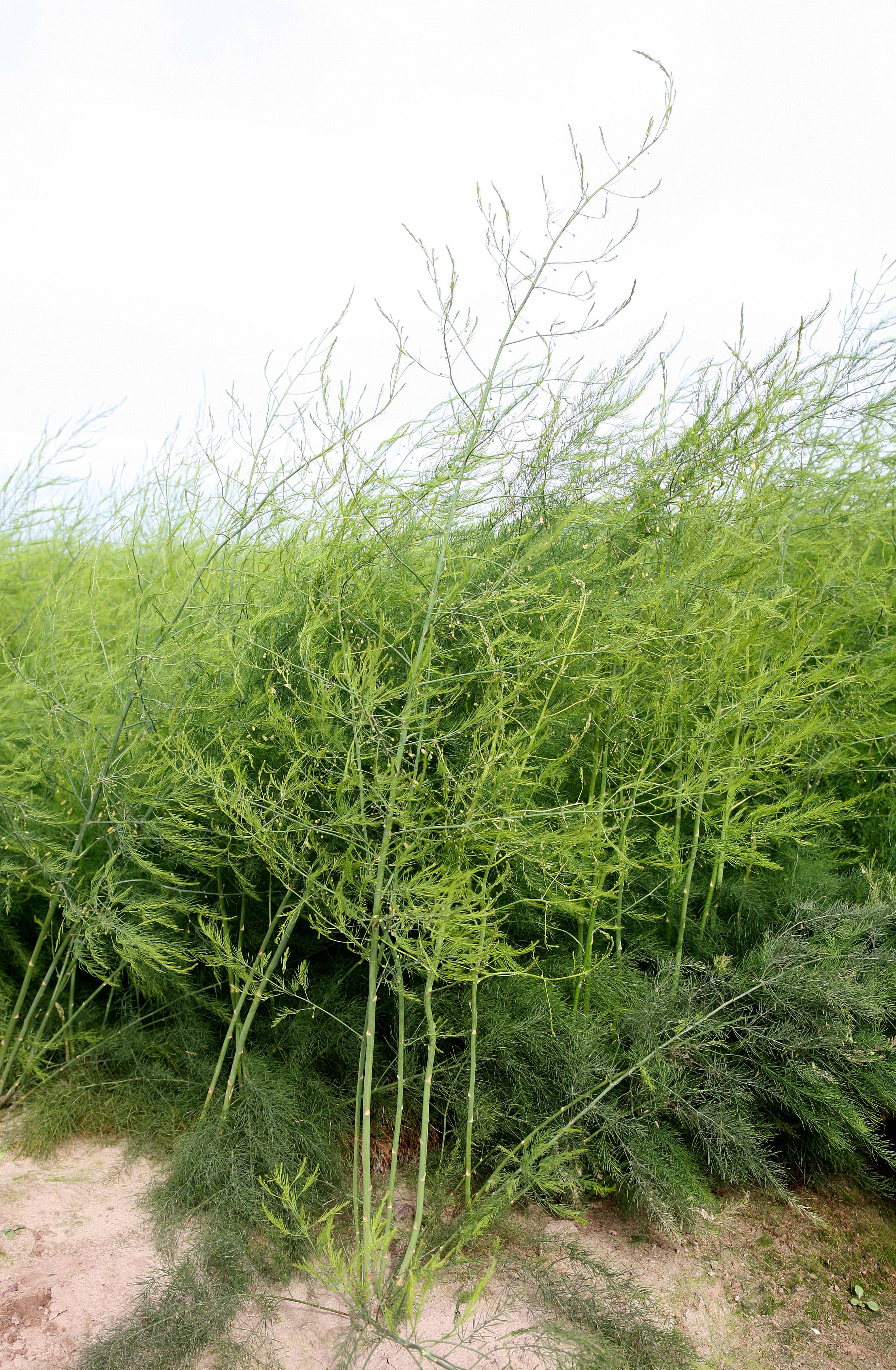 Aceera Nederlandse asperge loof